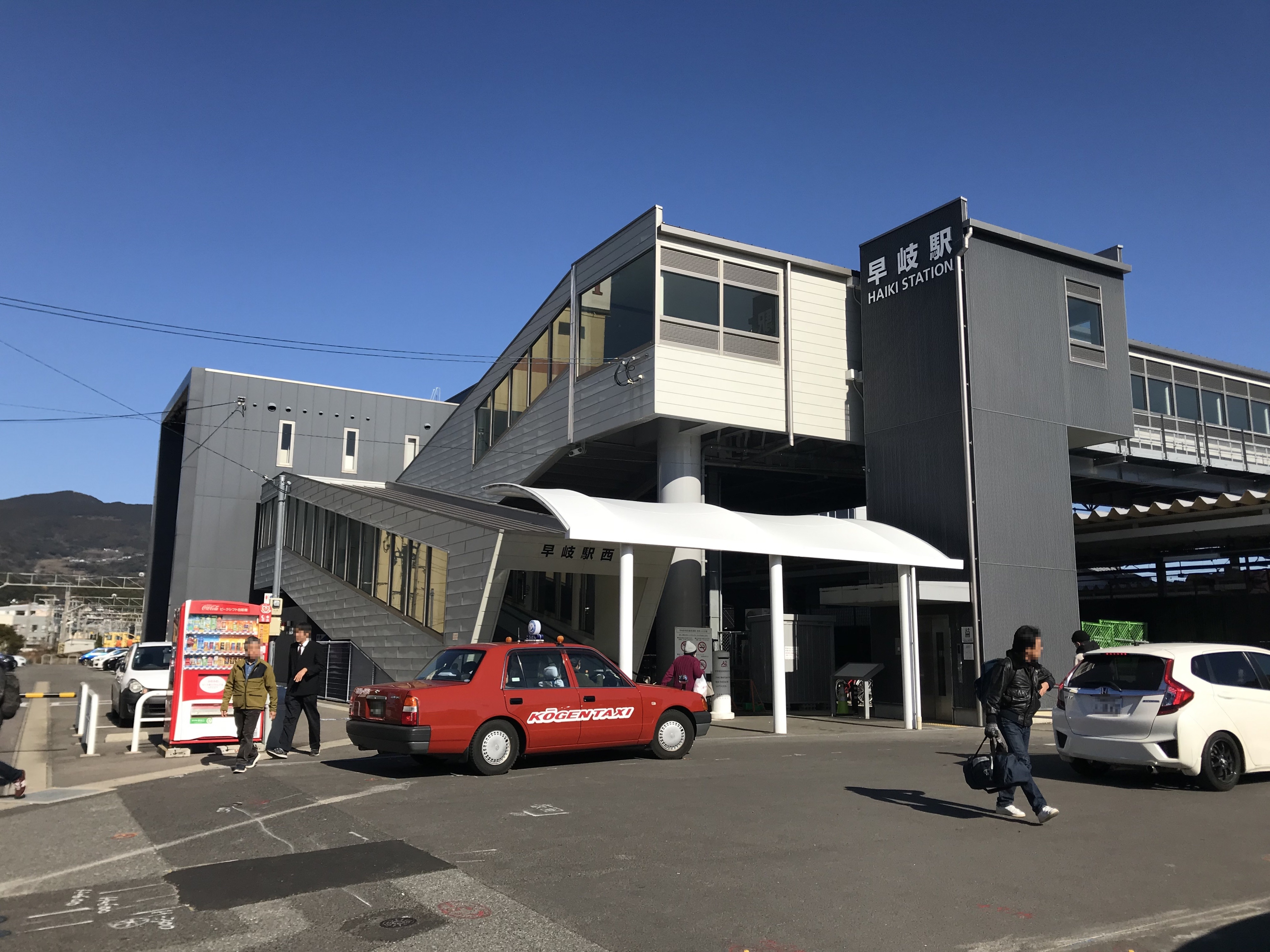 早岐駅の駅舎